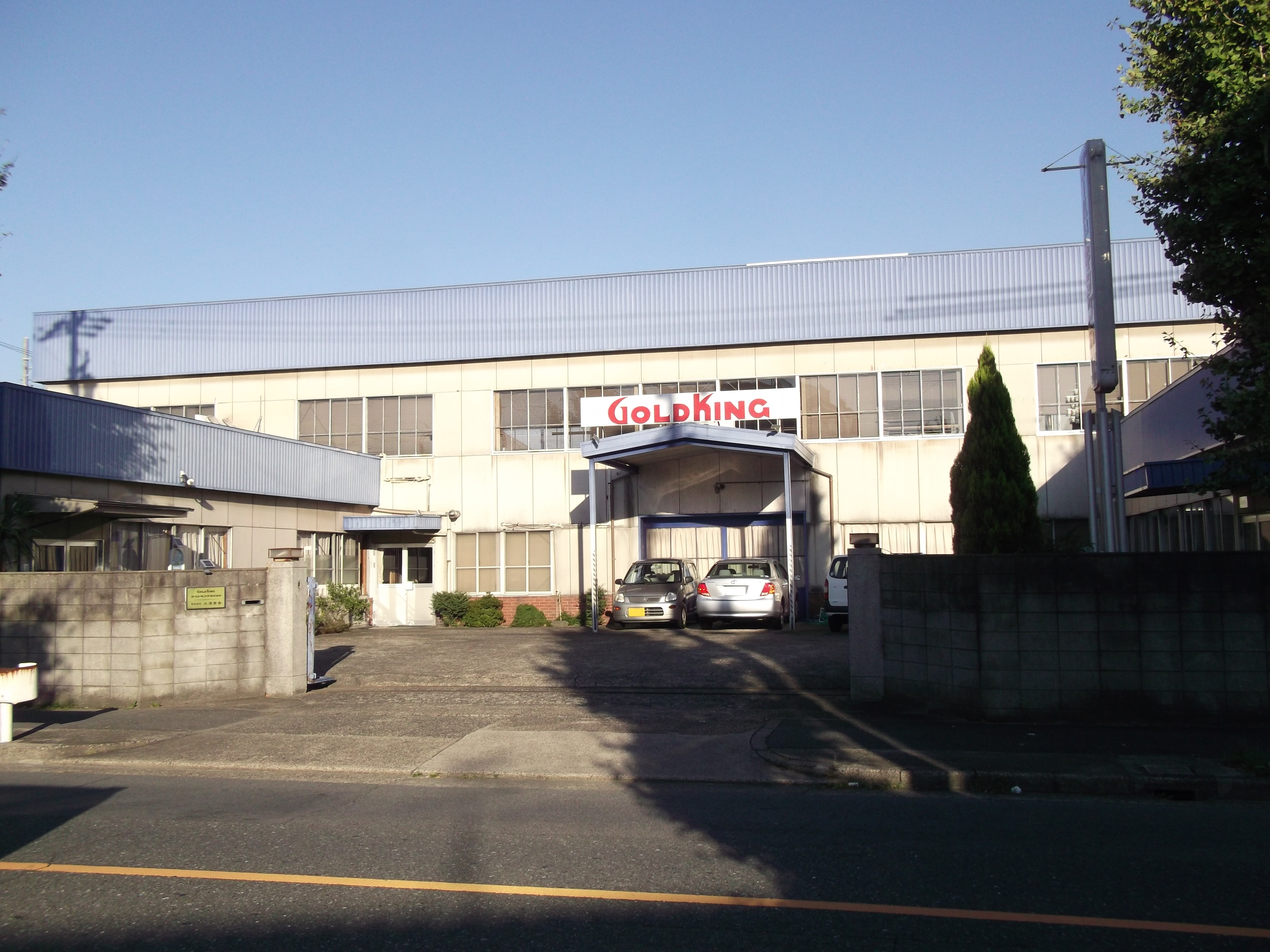 名古屋市中川区のゴールドキング本社を西側公道より撮影。ナンバープレートにつき画像修正（ナンバーの消去）済